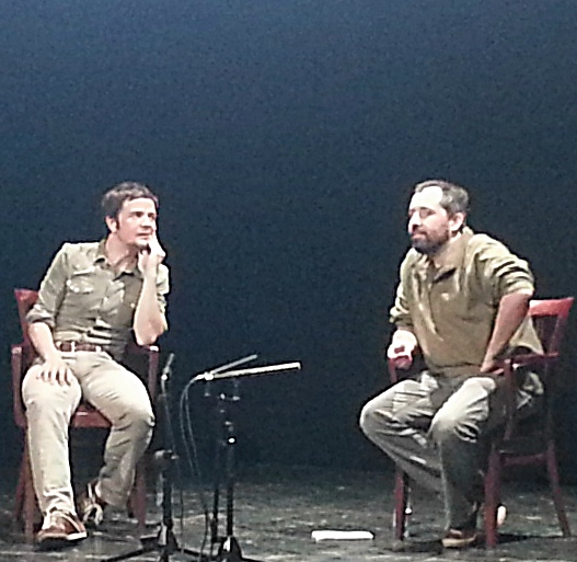 Pintér Béla és Schilling Árpád a „Színházcsinálók“ című beszélgetéssorozatban. Budapesti Katona József Színház.